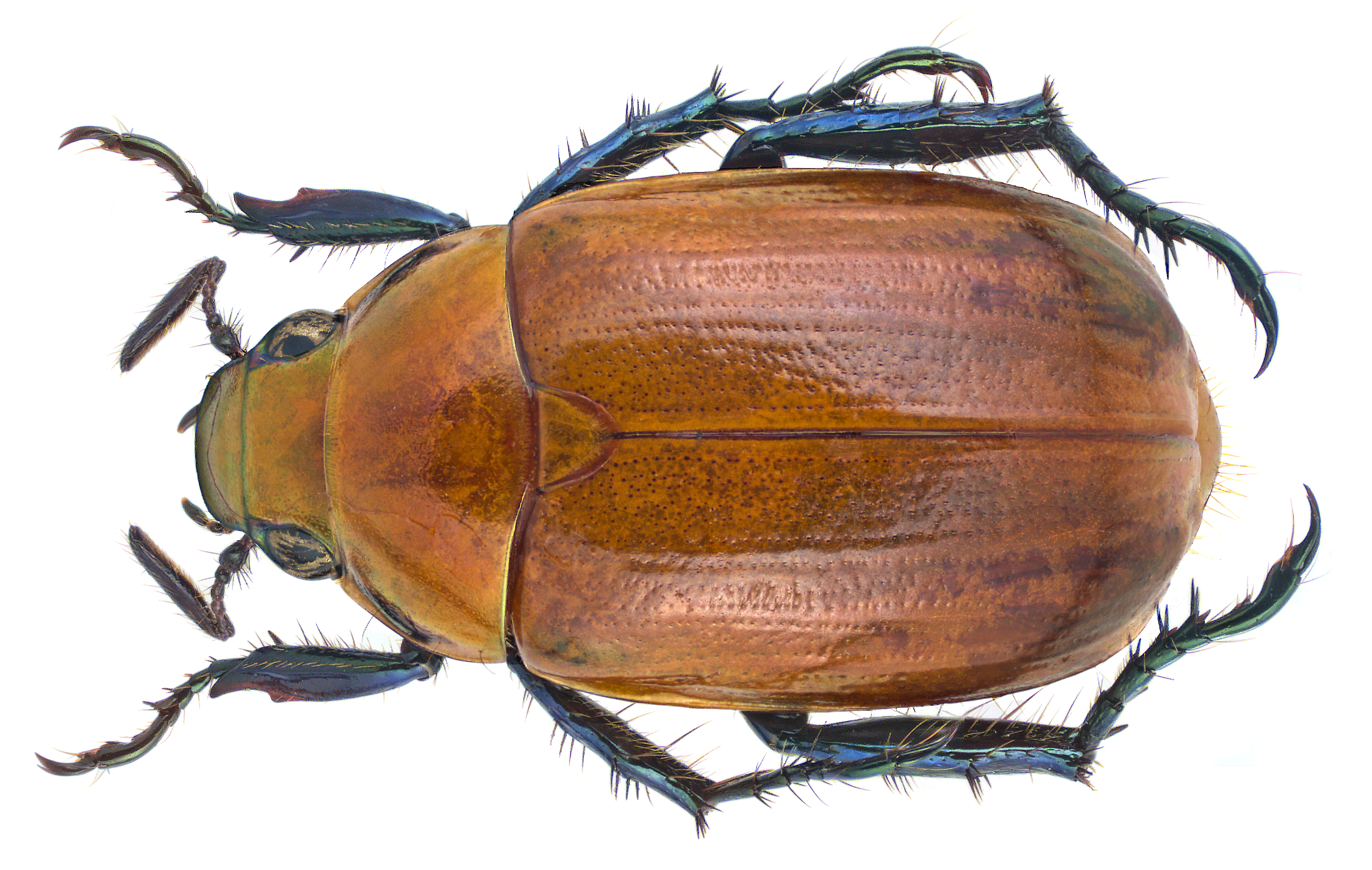 Family: Scarabaeidae (Rutelidae) Size: 14,2 mm Location: N-Vietnam, Cao Bang Prov., vic. Vin Den, Nui Pia Oac Nature Res., 900-1300 m leg. A.Skale, 6.-10.V.2013; det. Zorn, 2015 Photo: U.Schmidt, 2016